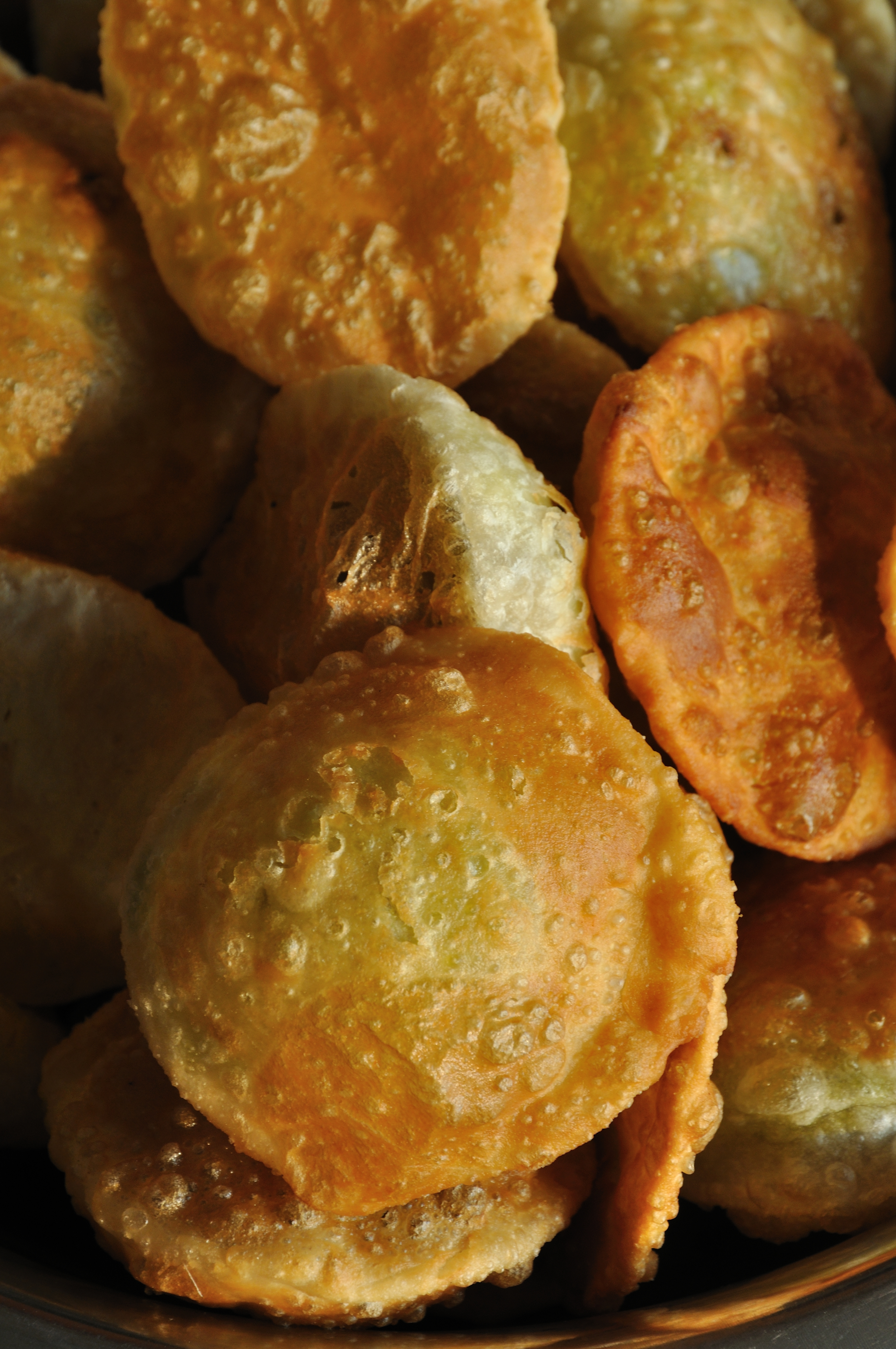 Photographed at Kolkata.